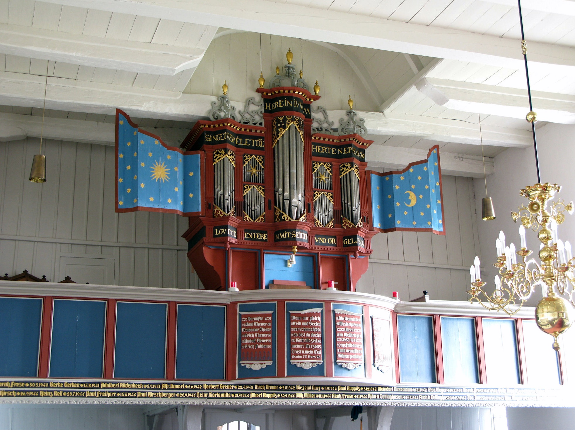 Orgel in Westerhusen, Landkreis Aurich